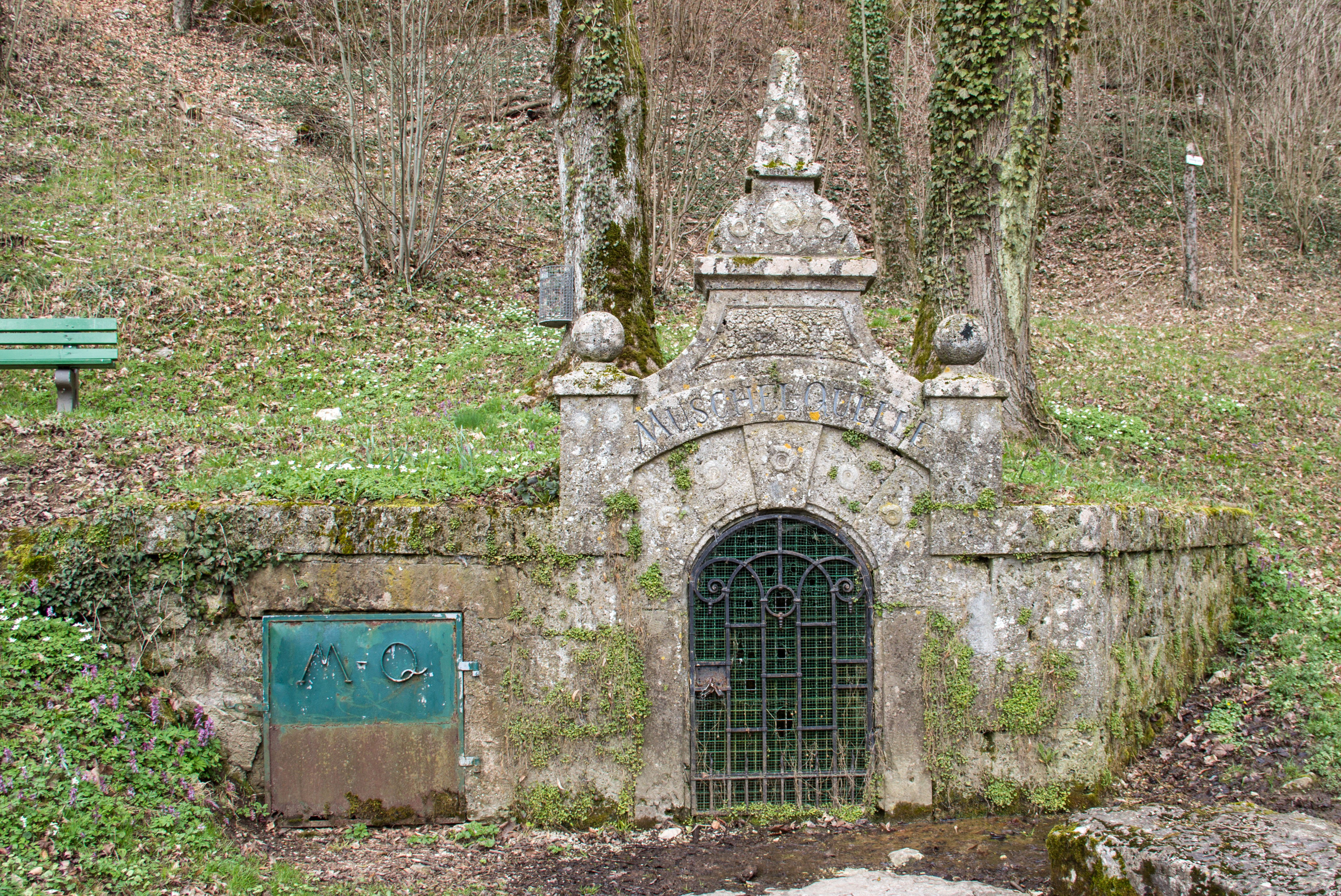 Muschelquelle, Streitberg